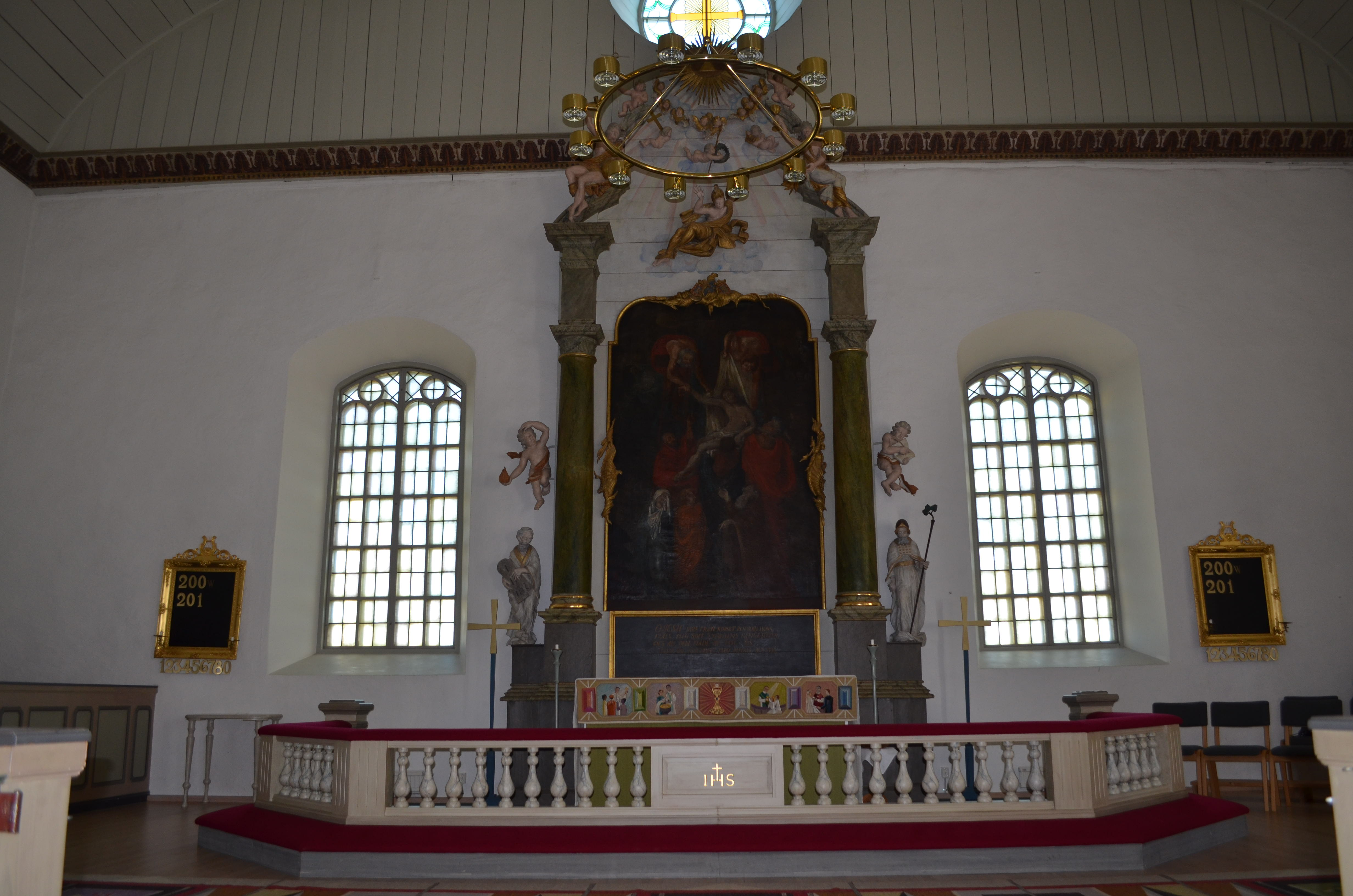 Altaret